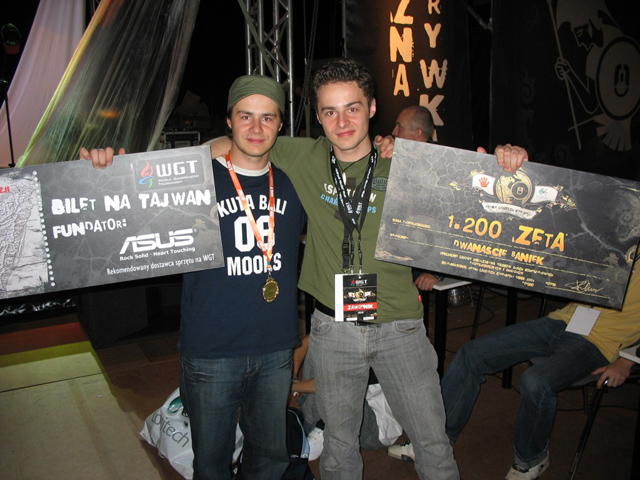 Heyah i bilet na Tajwan